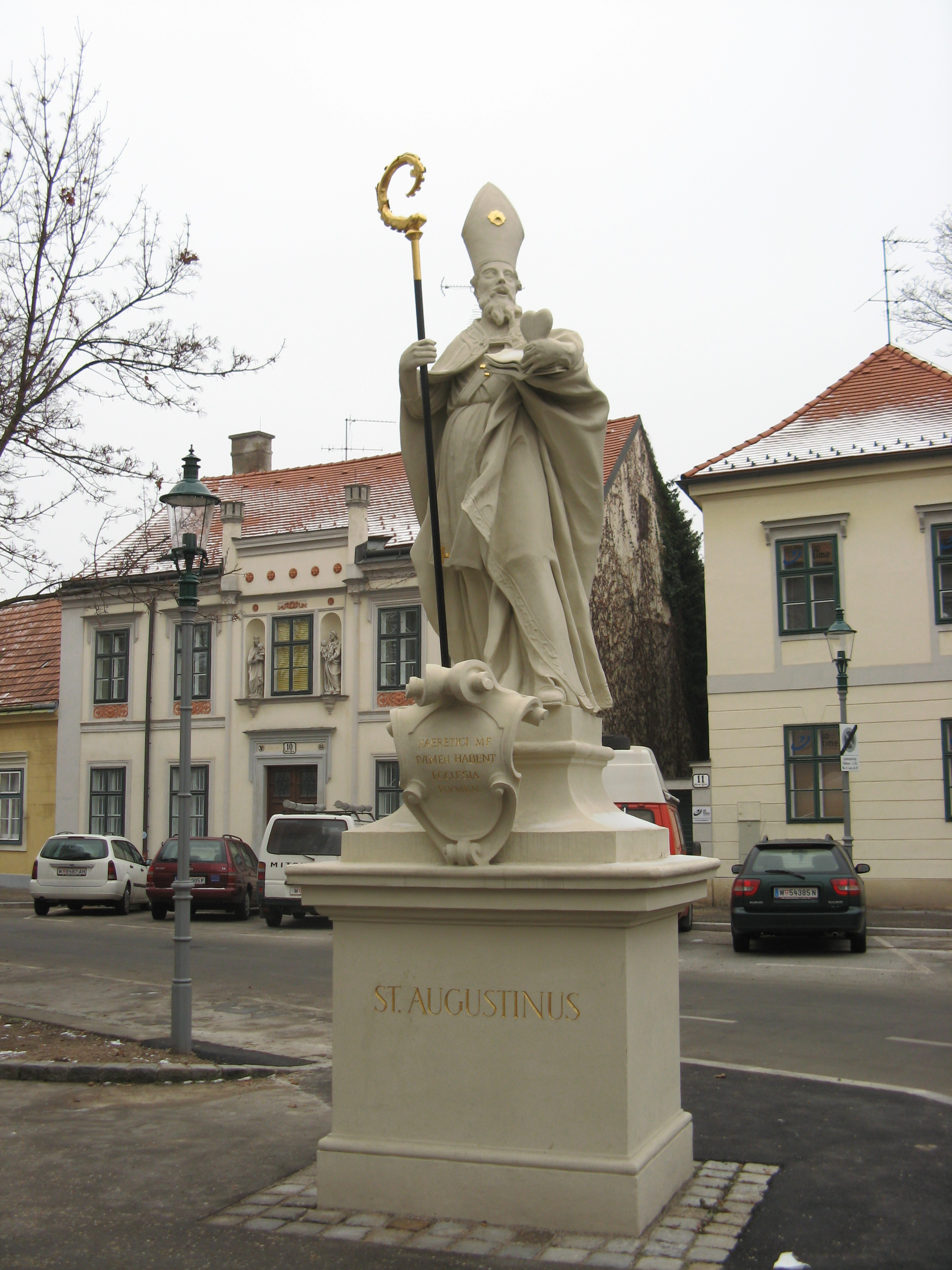 Statue des hl. Augustinus vor der Altmannsdorfer Kirche zum hl. Oswald in Wien-Meidling